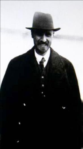 El ministro de Correos y Telégrafos y político georgiano menchevique Irakli Tsereteli, en Petrogrado en mayo de 1917.